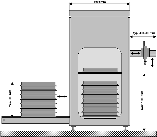 Palettiersystem/Magaziniersystem SPEED-Line in der Seitenansicht